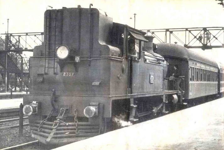 En Villa del Parque o Saenz Peña